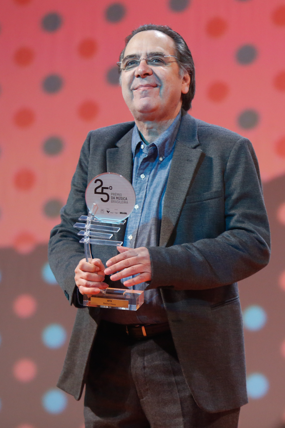 Categoria MPB - Melhor Álbum: Edu Lobo durante o 25º Premio da Musica Brasileira no Theatro Municipal. Foto: Roberto Filho (14/05/14)